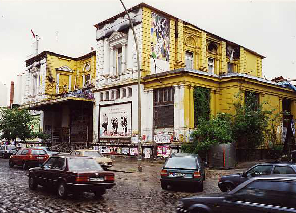 Seitenansicht der Roten bzw. „alten” Flora im Hamburger Schanzenviertel.